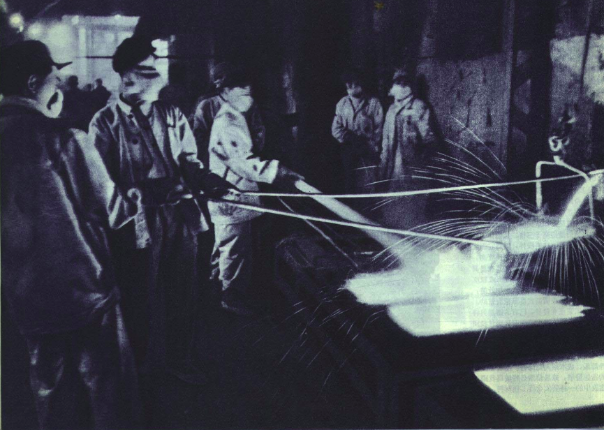 1952年沈阳炼钢厂